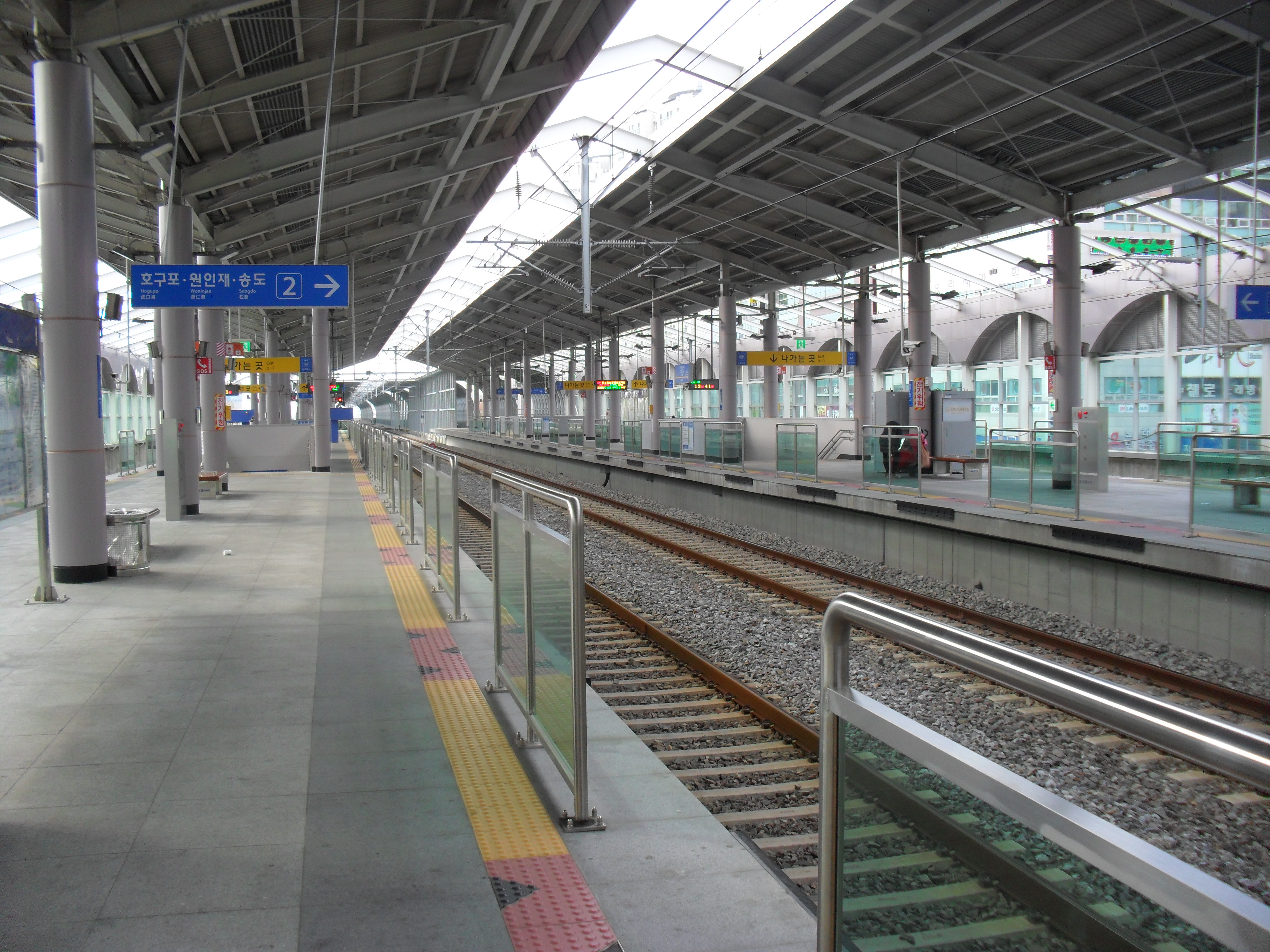 수인선 인천논현역 홈